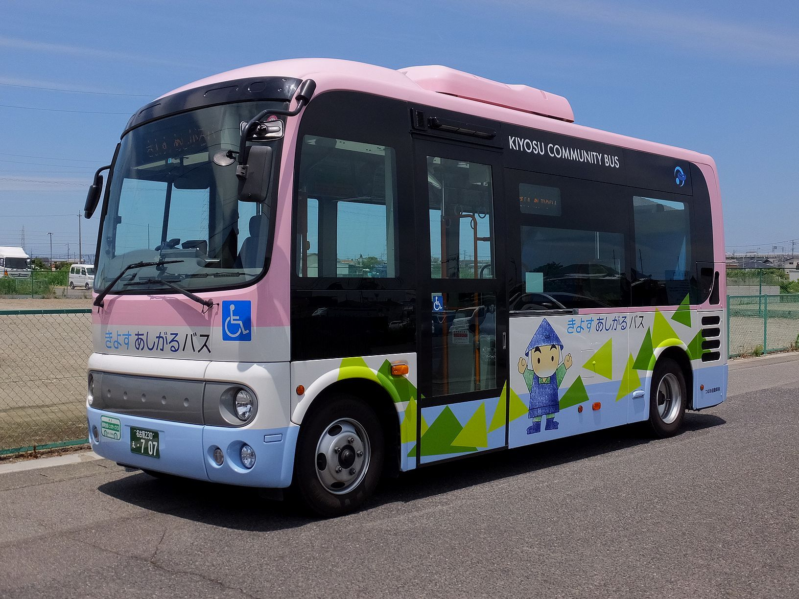 日野ポンチョ ショート 1ドア 定員28名 車いす固定装置付